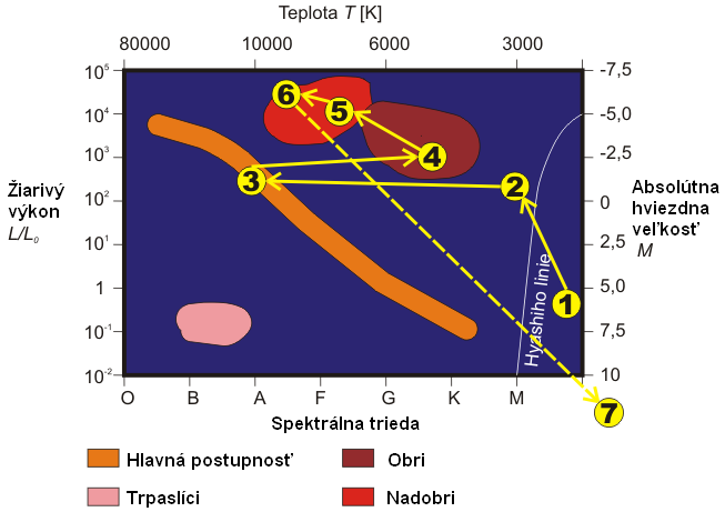 Slovenská verzia súboru Soubor:HR-diagram 03.png. Vývoj hviezd veľkých hmotností na Hertzsprungovom Russelovom diagrame